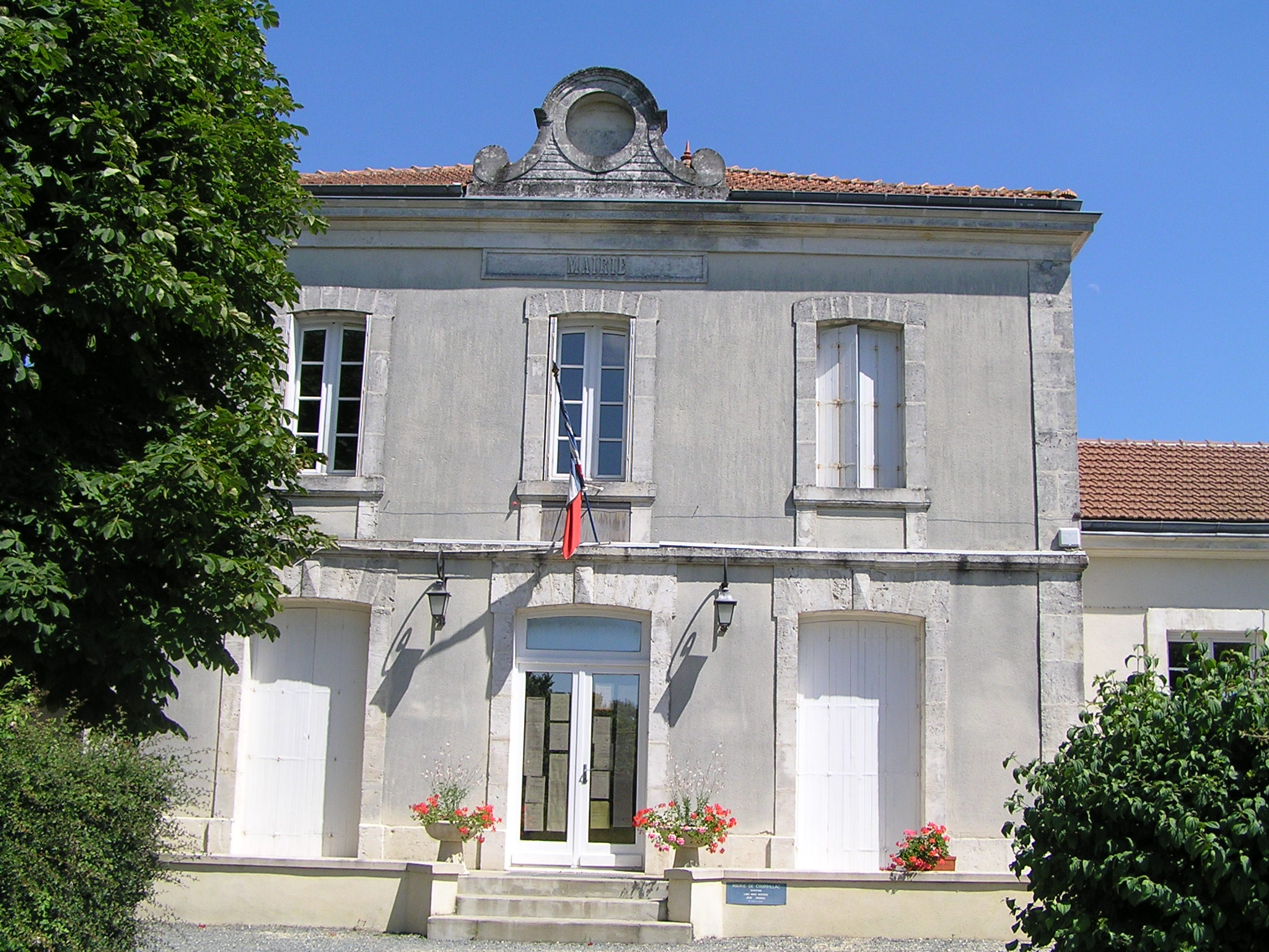 mairie de Courbillac